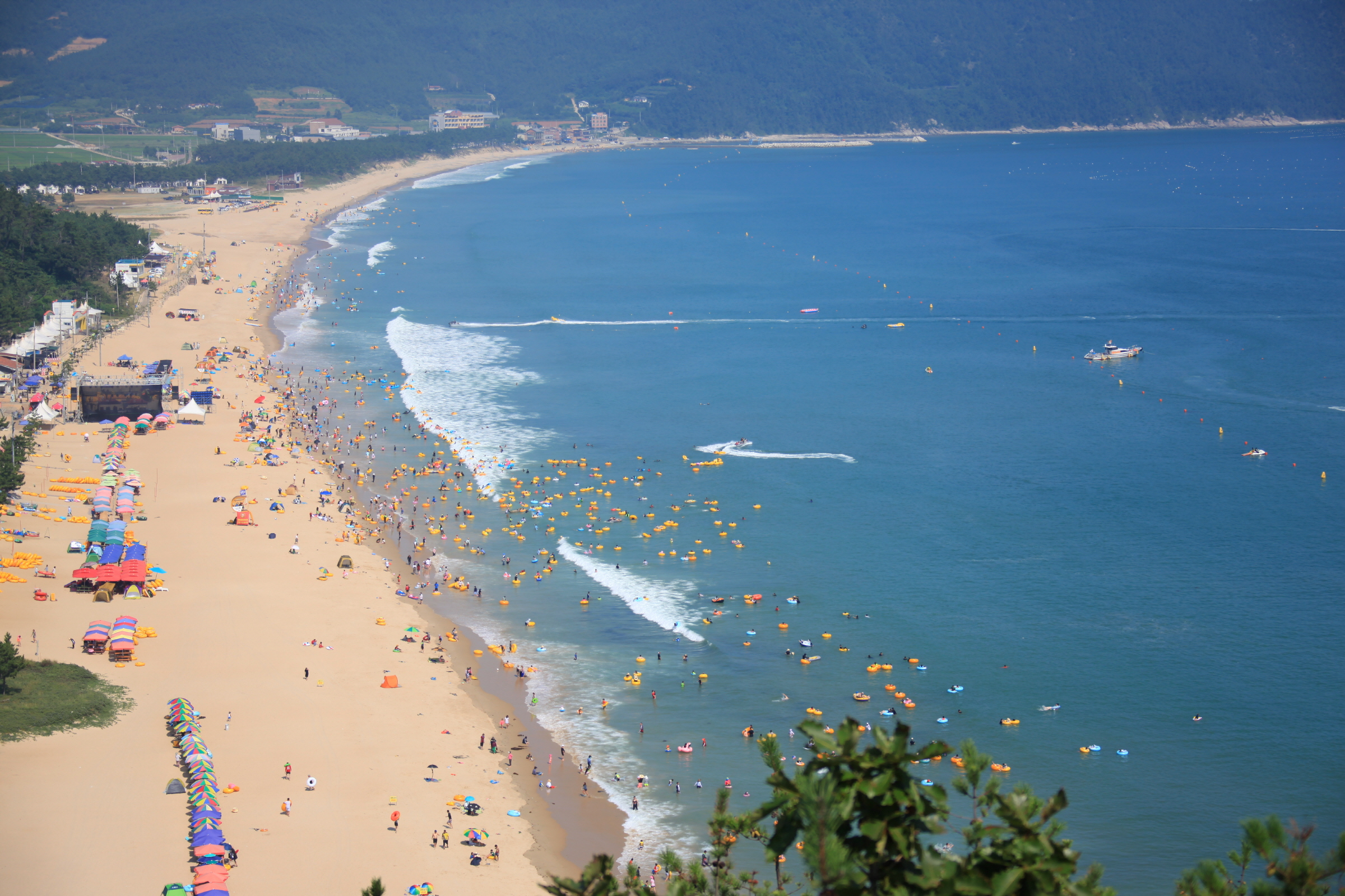 해수에 포함된 미네랄 등 기능성 성분이 전국에서 가장 풍부한 남해안 최고의 해수욕장이다.